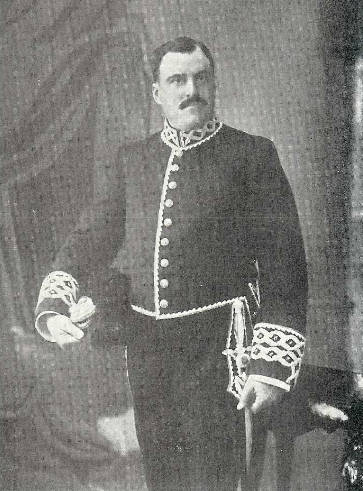 Memoria de los trabajos efectuados y concursos pecuarios celebrados en Santander en los años de 1911 y 1912